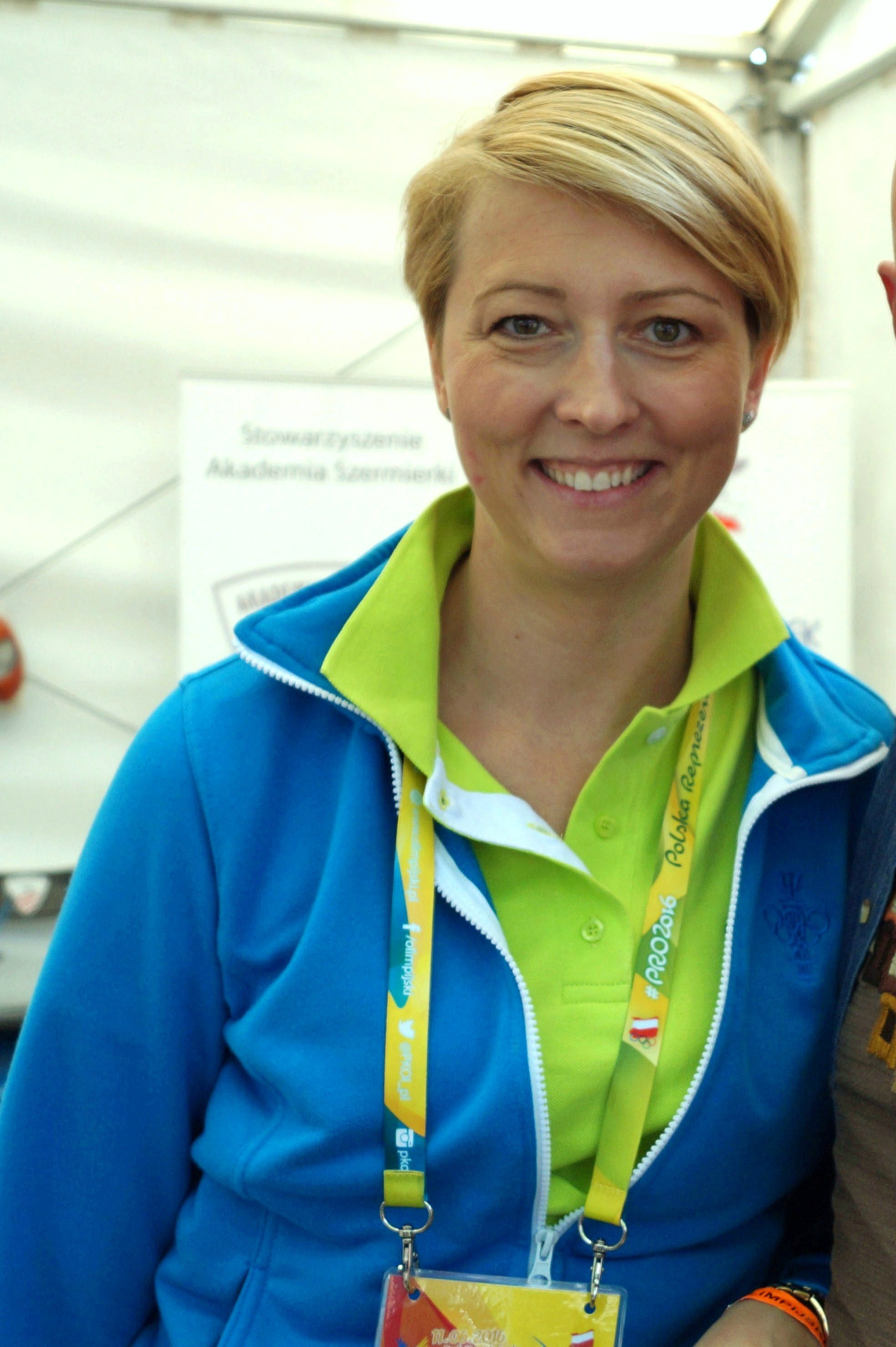 Magdalena Mroczkiewicz, florecistka.